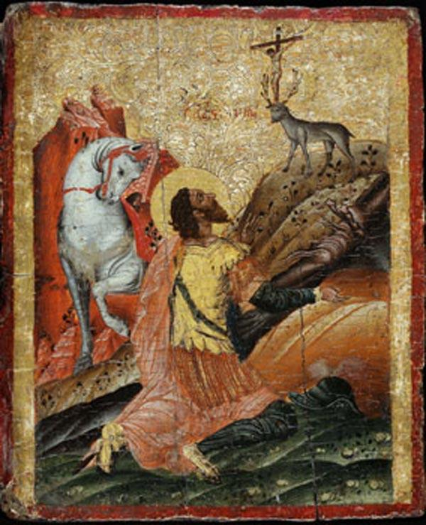 Видение вмч. Евстафия Плакиды. Первая половина — середина XVII в. Крит Собрание К. В. Воронина